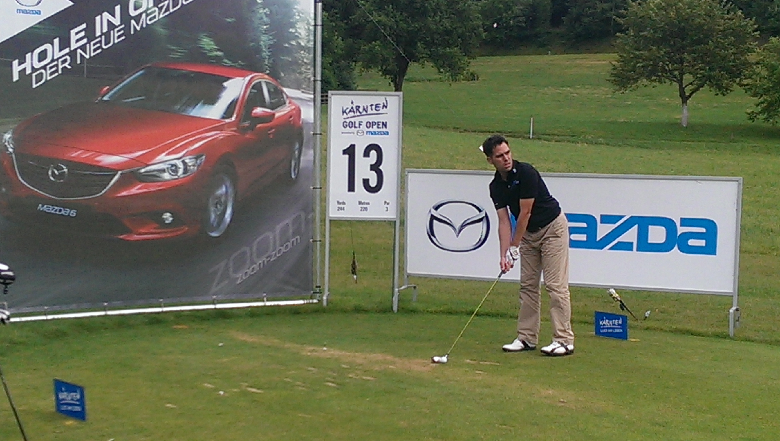 Tijdens het Kärnten Golf Open (Challenge Tour)